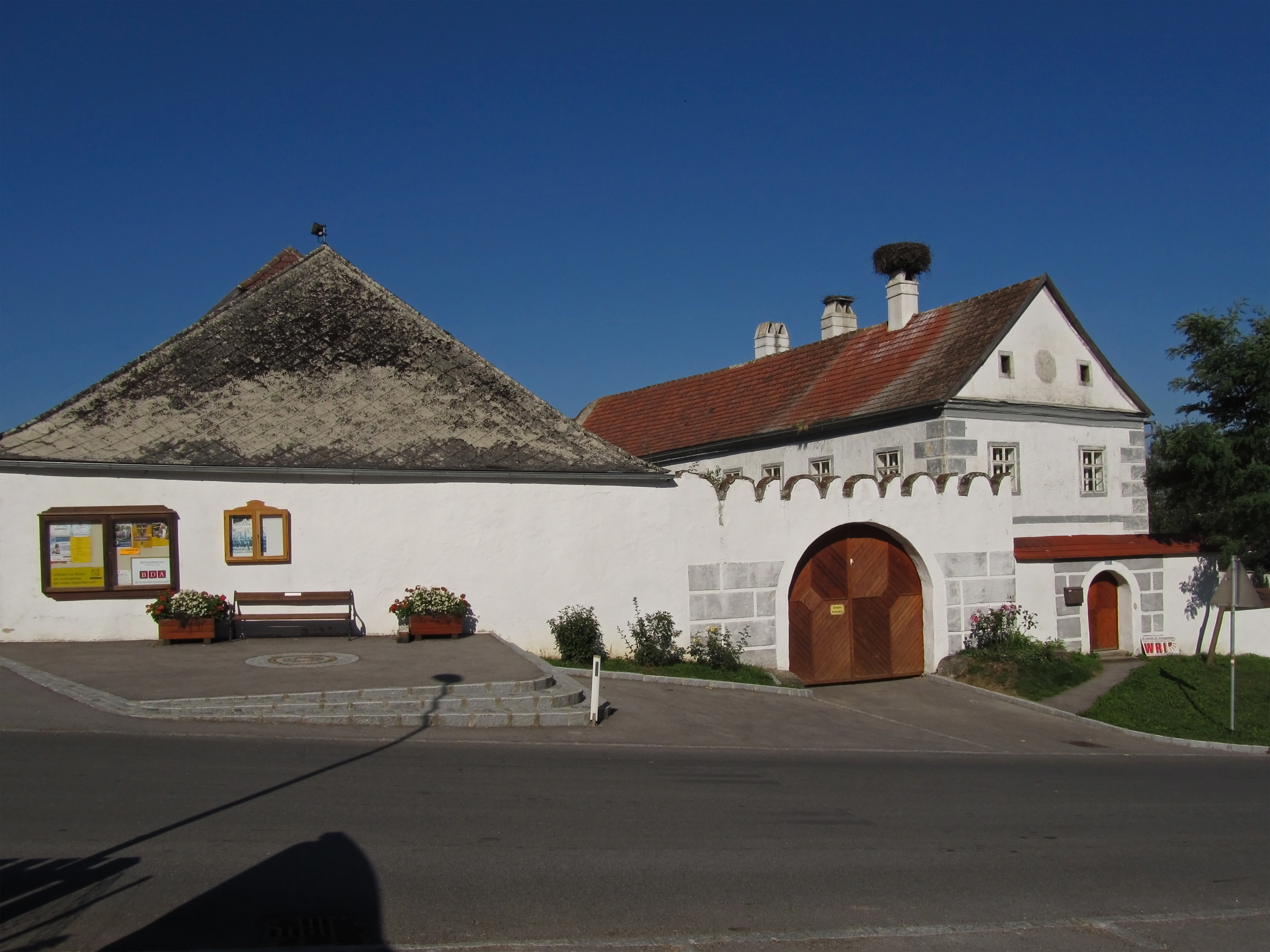 Der Pfarrhof stammt im Kern aus dem Mittelalter. Die beiden jeweils zweigeschoßigen Trakte liegen einander gegenüber und sind durch eine Renaissance-Tormauer miteinander verbunden.